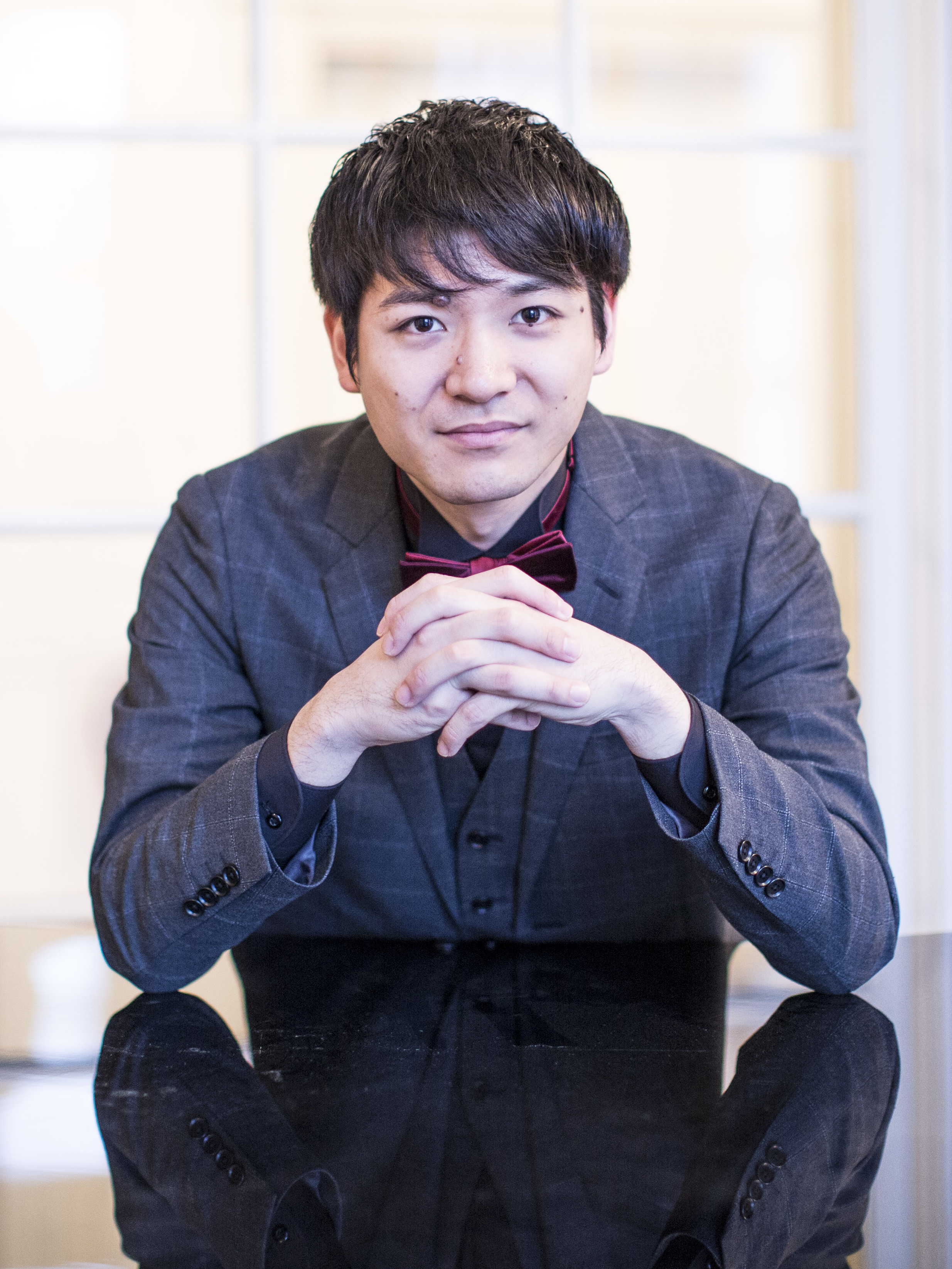 ピアニスト